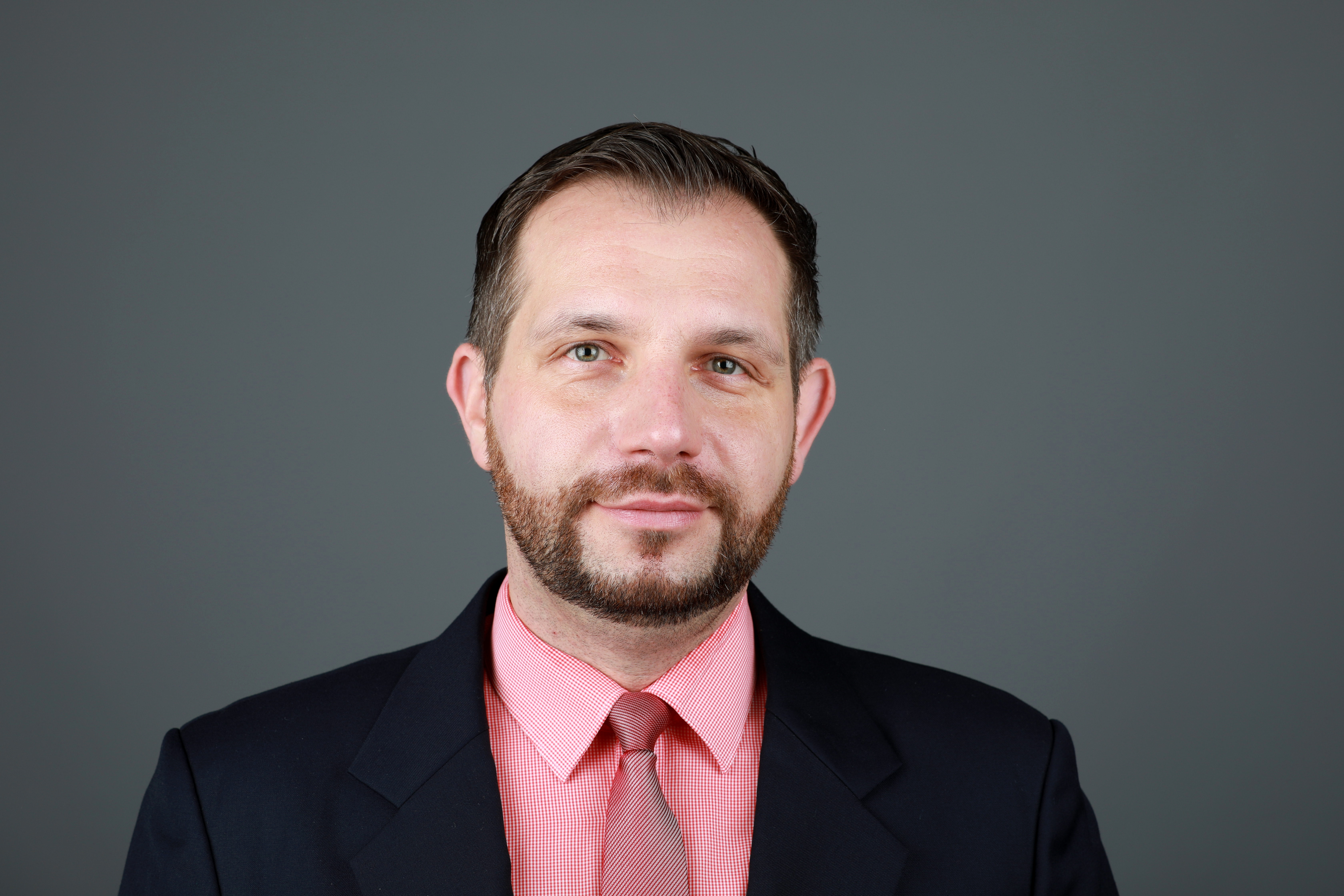 Tom Schreiber (SPD)